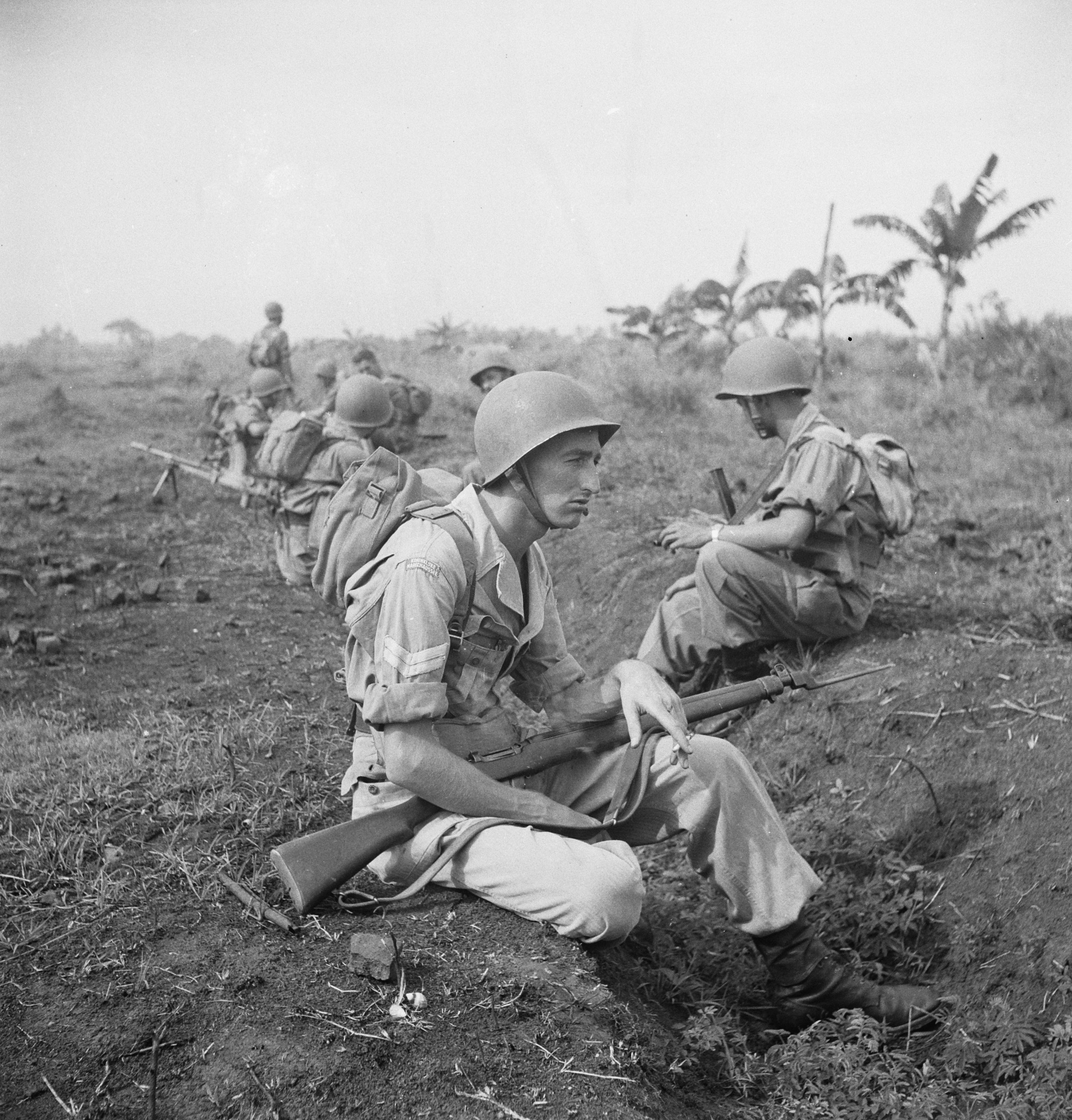 Collectie / Archief : Fotocollectie Dienst voor Legercontacten Indonesië Reportage / Serie : [DLC] V.P.T.L. Beschrijving : [een sectie militairen tijdens een rustpauze] Annotatie : V.P.T.L. = Voorschrift voor de uitoefening van de Politiek-Politionele Taak van het Leger (optreden tegen guerillastrijders). Dit voorschrift van het KNIL dateert al uit 1928, verscheen in 1936 en is gewijzigd en aangevuld in 1945 en in 1946 nog een keer uitgegeven, nu speciaal voor de KL. De fotoserie werd gebruikt voor de brochure "Kennis van het V.P.T.L., een kwestie van leven of dood / Mengetahoei akan V.P.T.L., soal hidoep atau mati" [DjK] Datum : 1946 Locatie : Indonesië, Nederlands-Indië Fotograaf : Fotograaf Onbekend / DLC Auteursrechthebbende : Nationaal Archief Materiaalsoort : Negatief (zwart/wit) Nummer archiefinventaris : bekijk toegang 2.24.04.03 Bestanddeelnummer : 15857